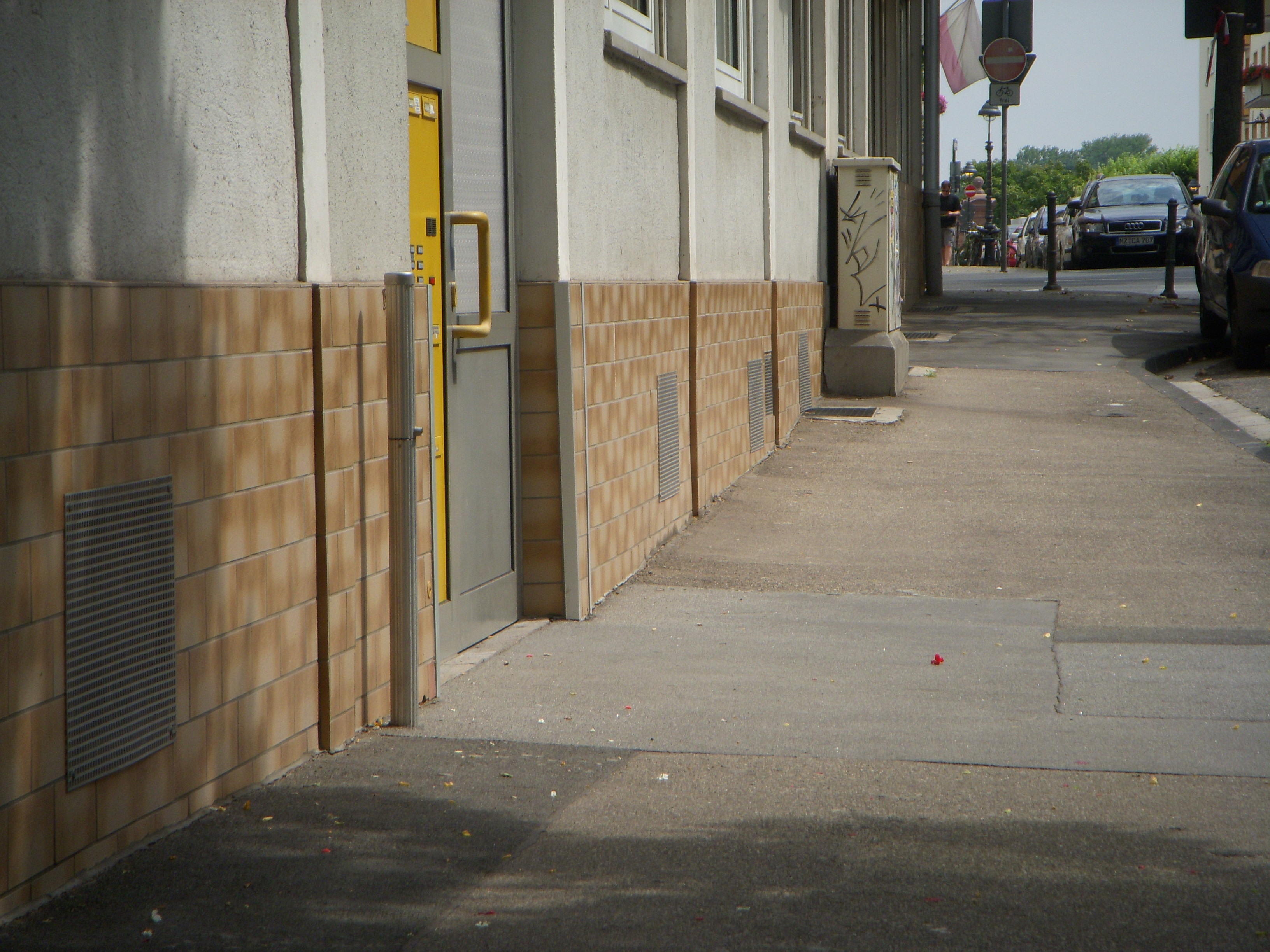 Tieferes Straßenniveau